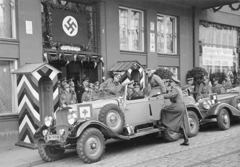 Einmarsch in das Sudetenland. Genaraloberst von Brauchitsch. 12.10.1938 Reichenberg. Sudetenland